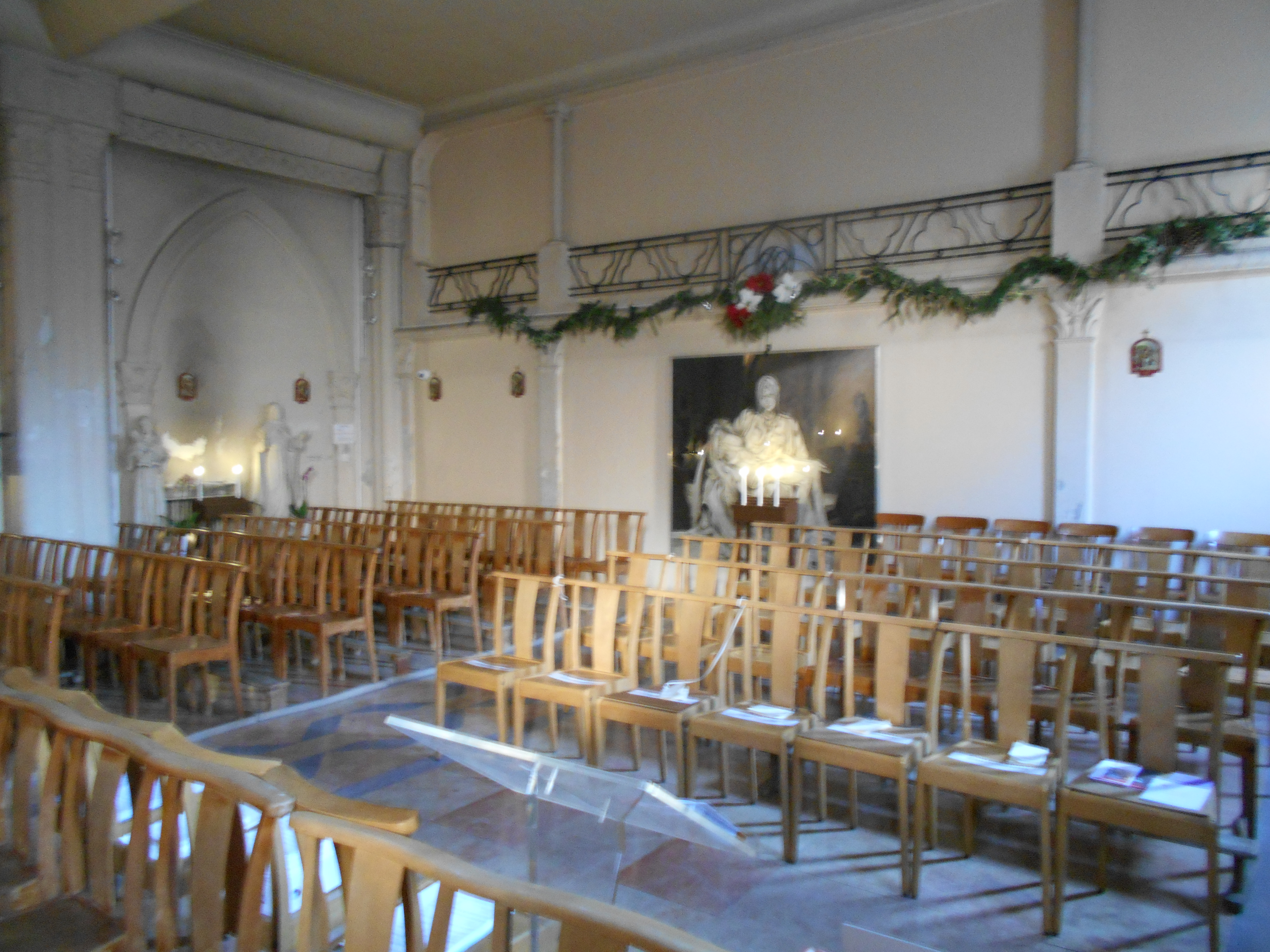 Capdavall de la capella de la Mare de Déu de Lurdes